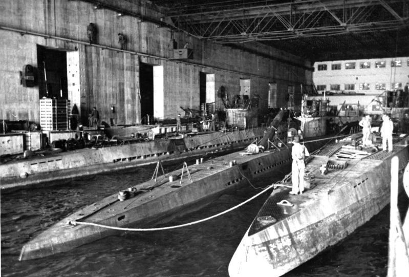 Im Innern eines U-Boot-Bunkers am Atlantik. Hier werden die von langer Feindfahrt heimgekehrten U-Boote, soweit nötig, repariert und wieder neu ausgerüstet. Aufnahme: OT-Kriegsberichter Adrian